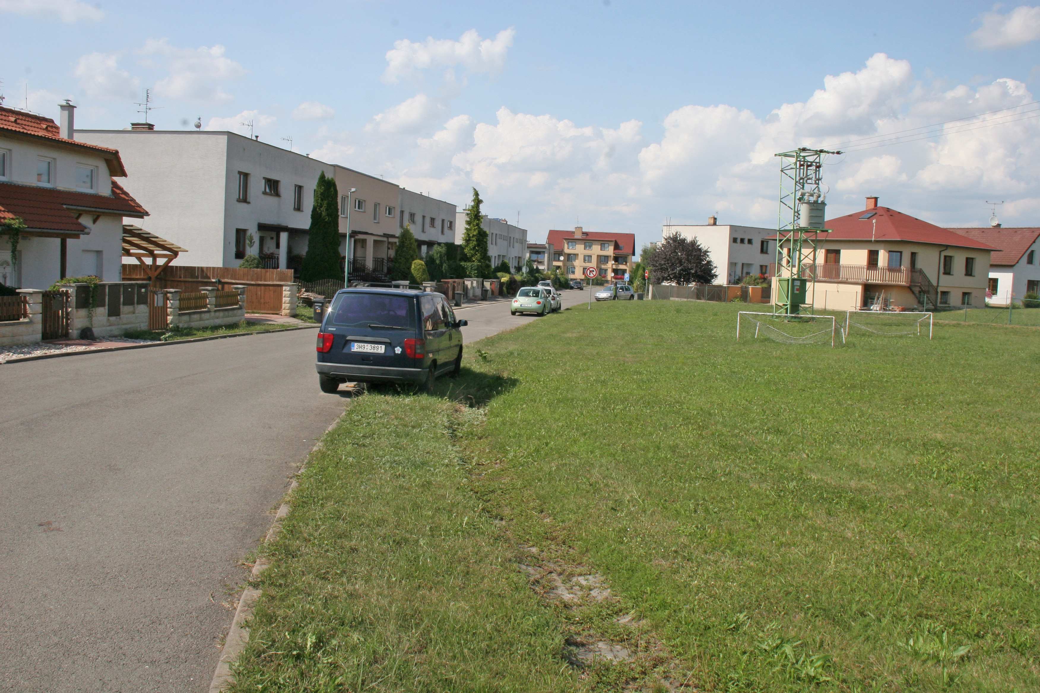 Černilov čp. 526